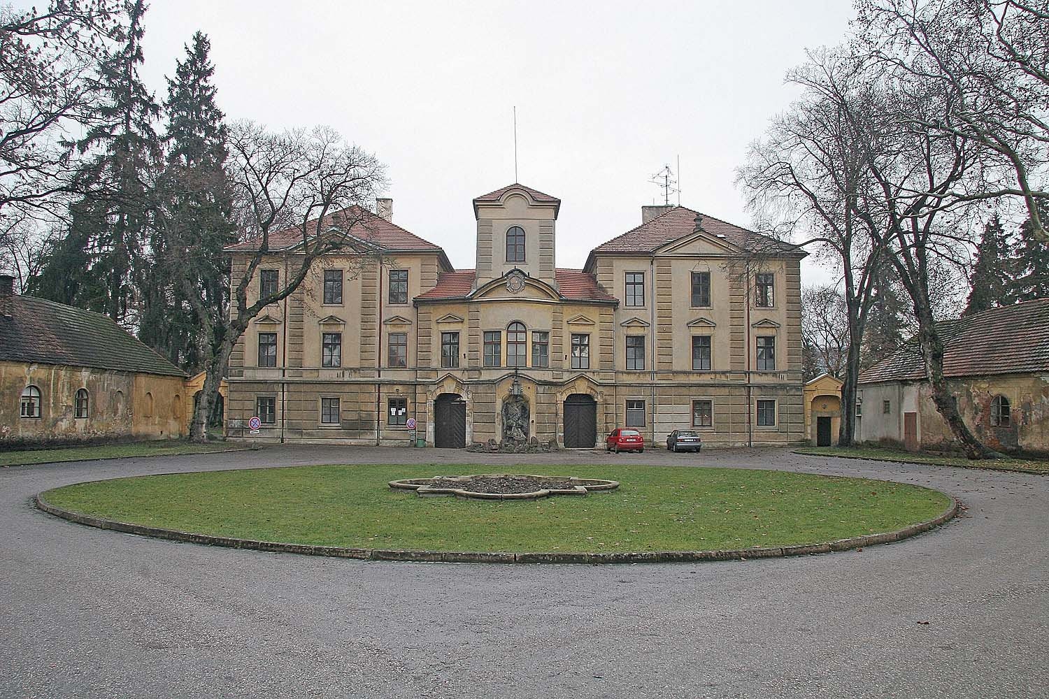 Zámek v Lázních Bělohrad, okres Jičín